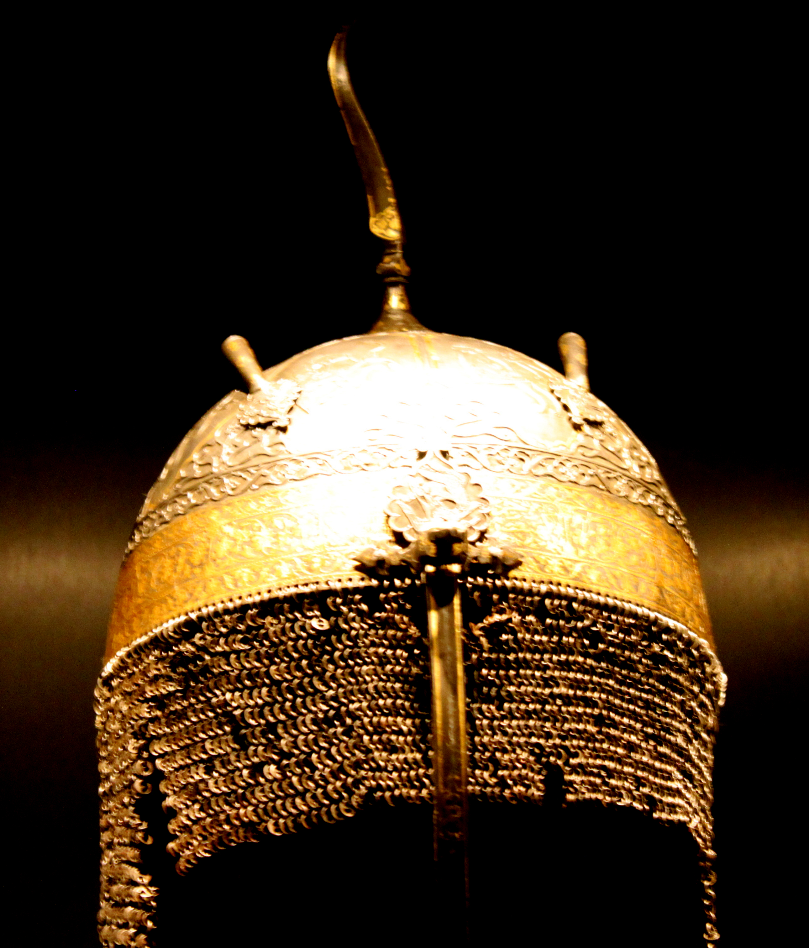 Dəbilqə, Səfəvilər, XVI əsrin I yarısı, Topqapı sarayı